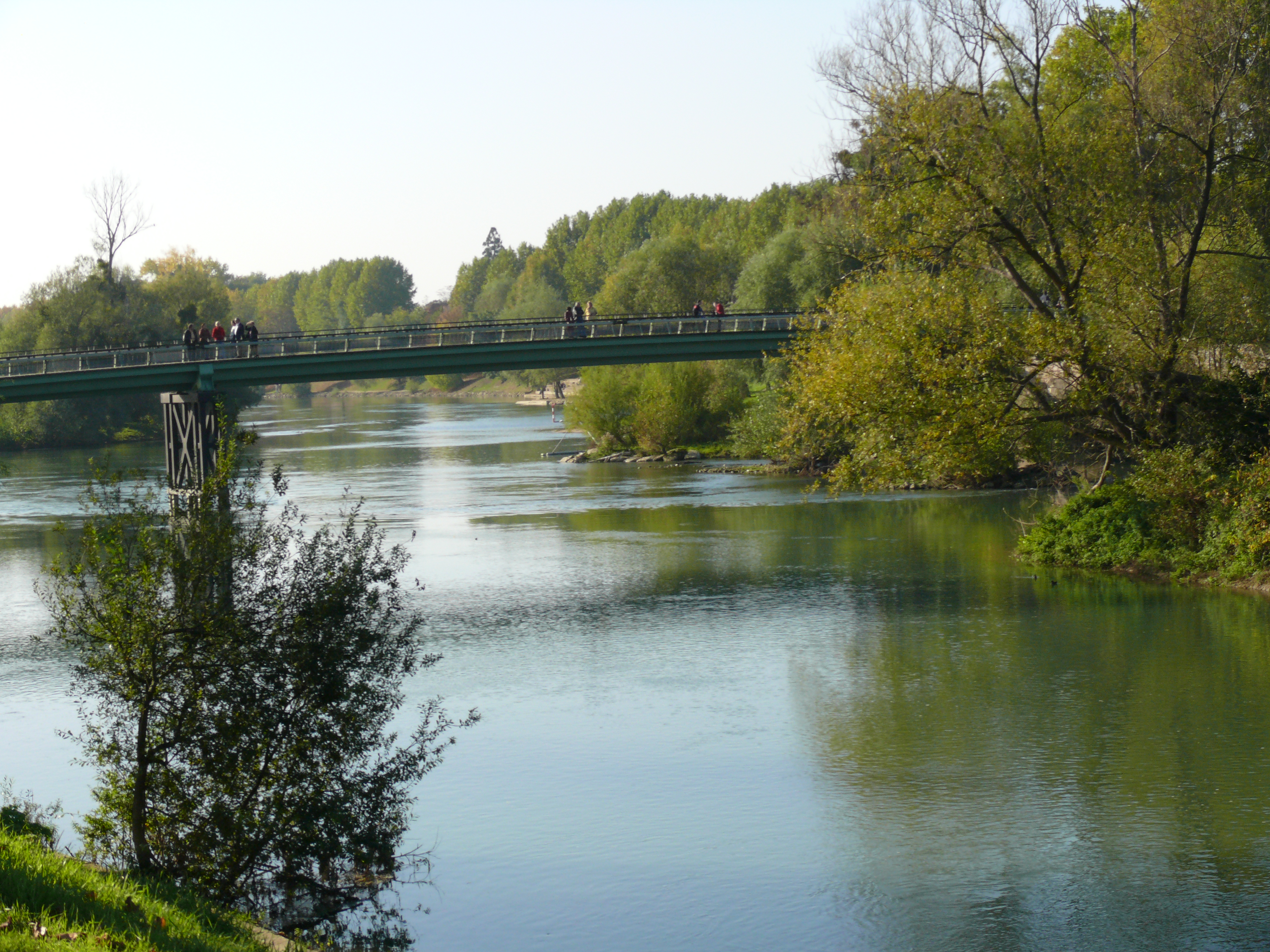 Passerelle de Champs-sur-Marne, enjambant la Marne entre Champs-sur-Marne et Gournay-sur-Marne.